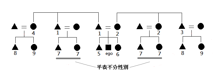 中文（台灣）: 本巴人的親屬稱謂型態，屬於二分合併型，而平表不分性別，交表區分。